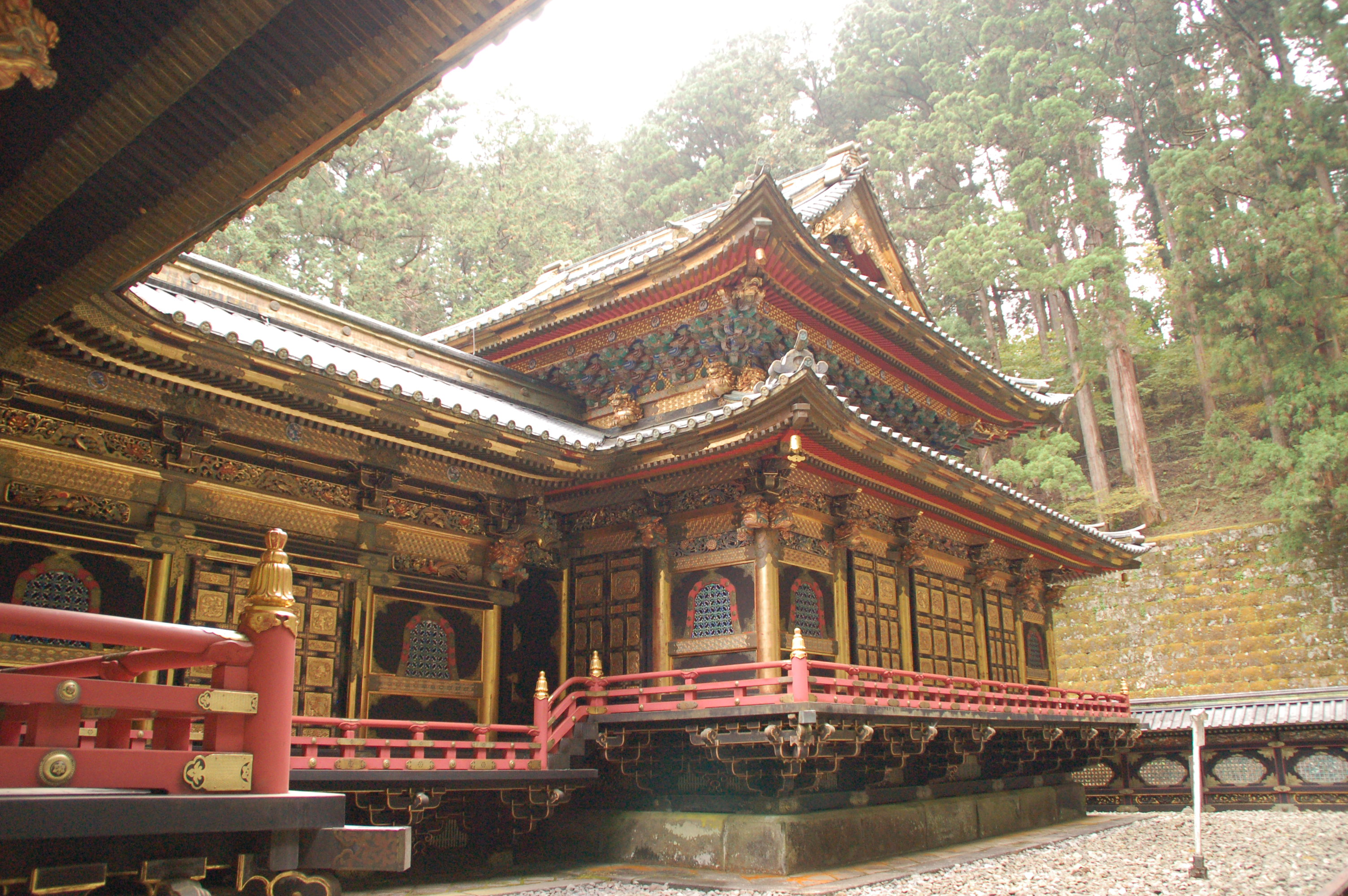 Rinnoji Taiyuin, Honden and Ai-no-ma